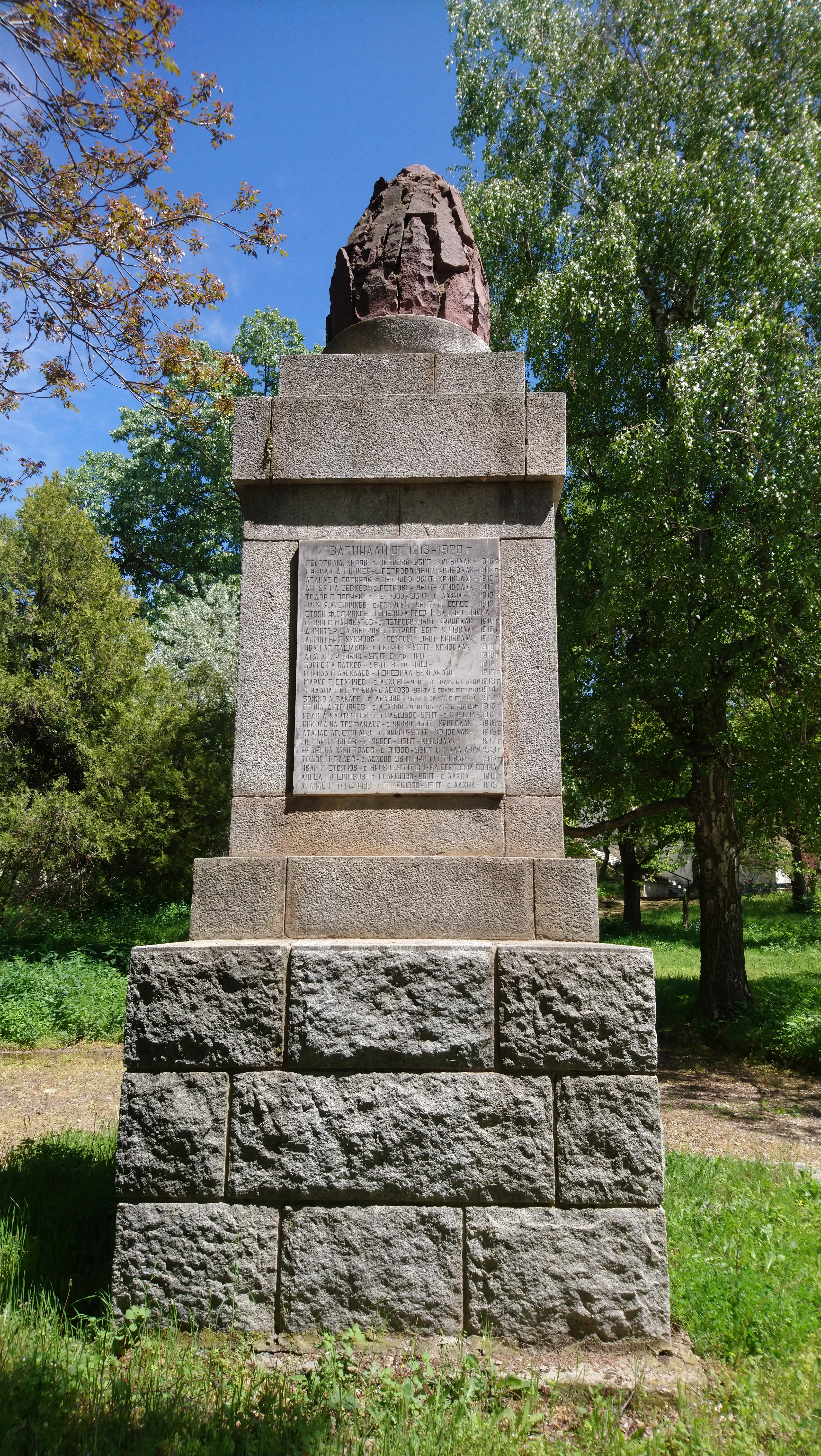 Военният паметник в центъра на село Петрово, област Благоевград